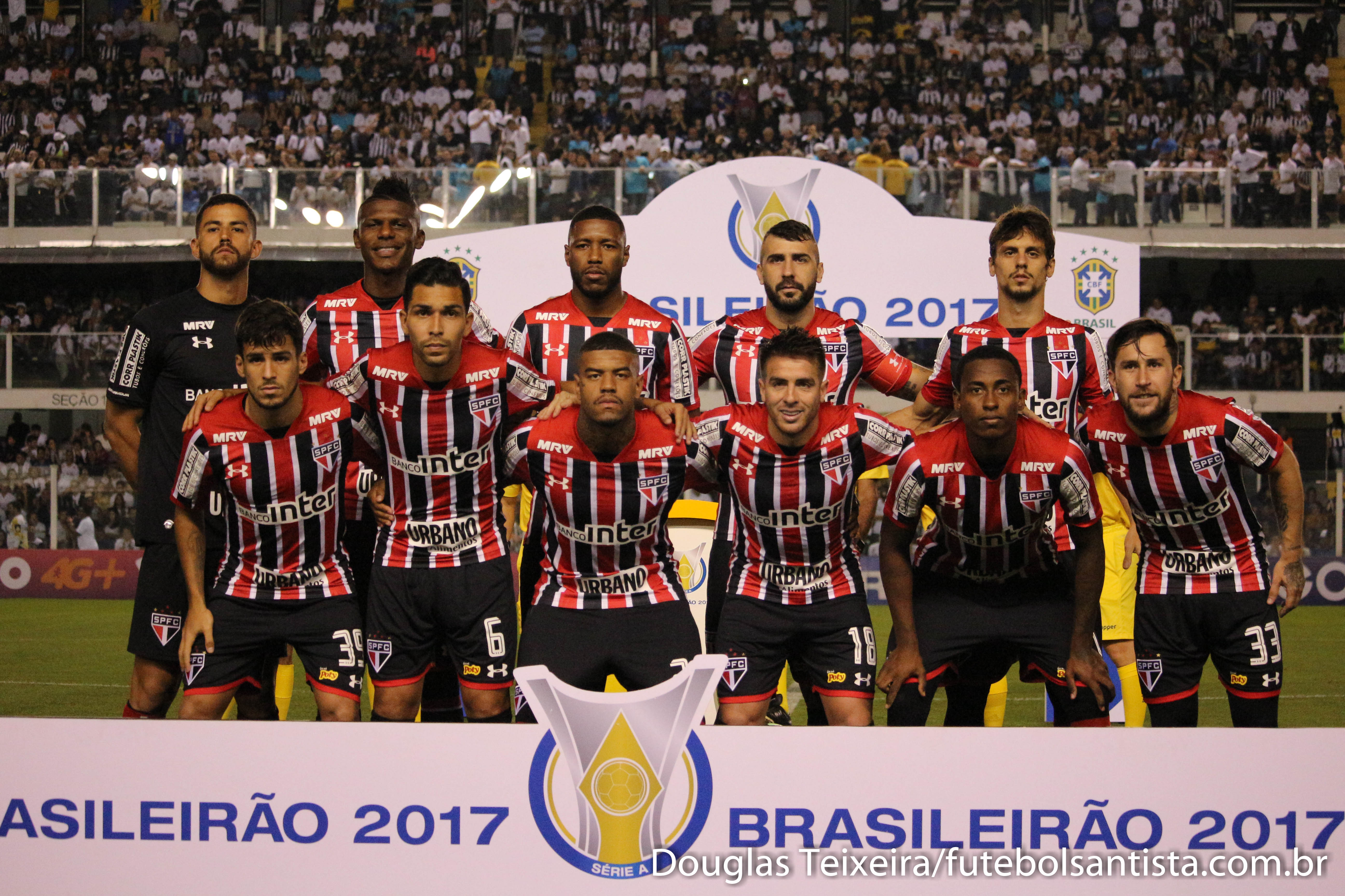 Equipe do São Paulo FC - Partida válida pelo Campeonato Brasileiro de 2017 - Série A.